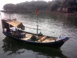 Boat in Vijaydurg Port, India